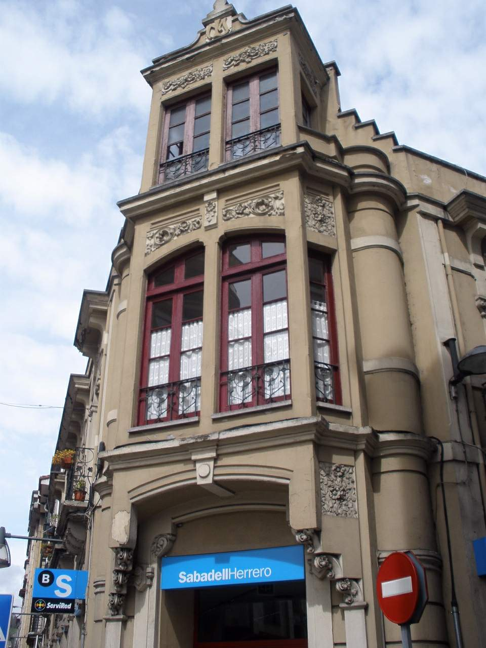 Pola de Laviana (Asturias)